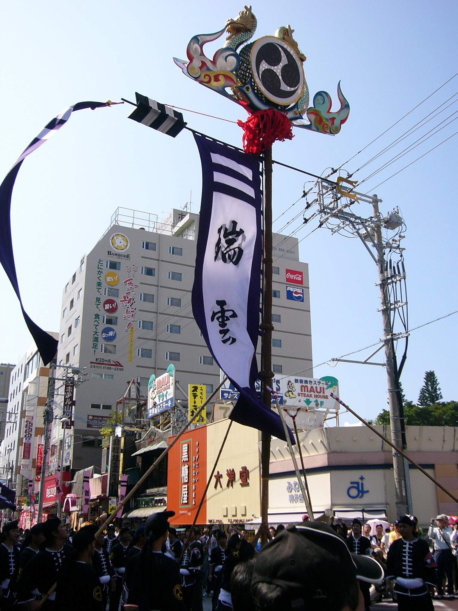 Naha Matsuri Shuri's Hata Gashira "Zui-Un"